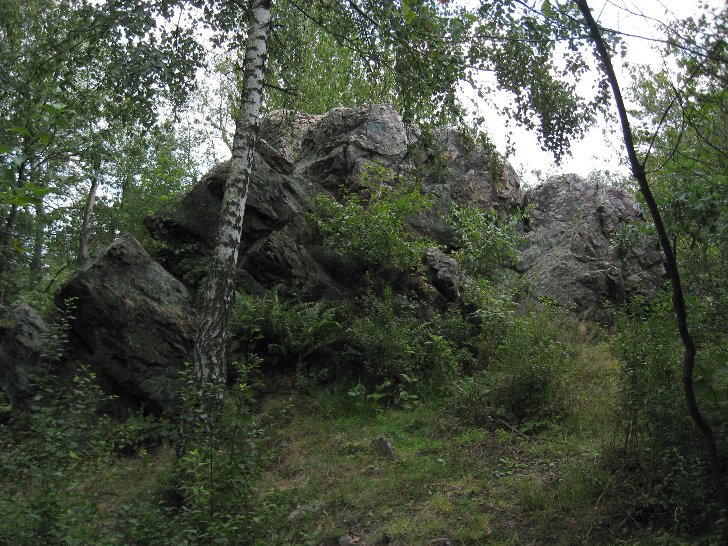 Diabelski Kamień na Klonówce w Górach Świętokrzyskich